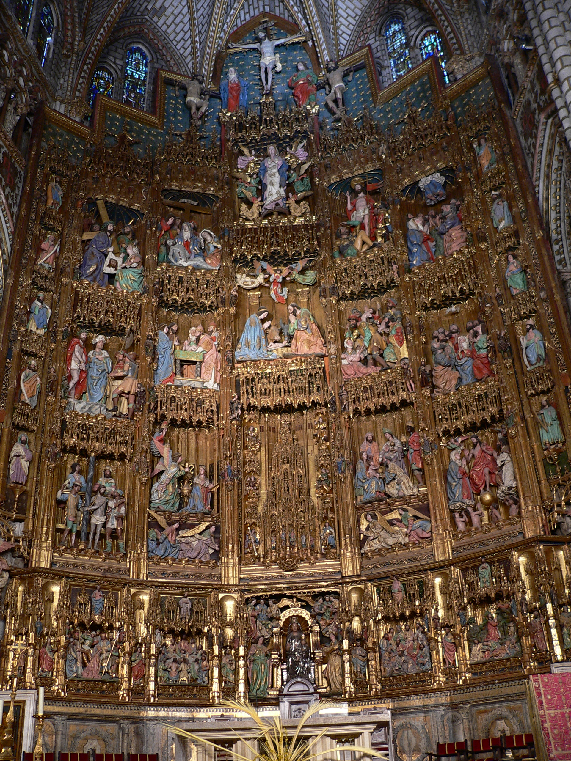 Descripción: Catedral de Toledo Objeto: Altar Mayor Arte: religioso Photógrafo: © Manuel González Olaechea y Franco Fecha : 1 de abril de 2007